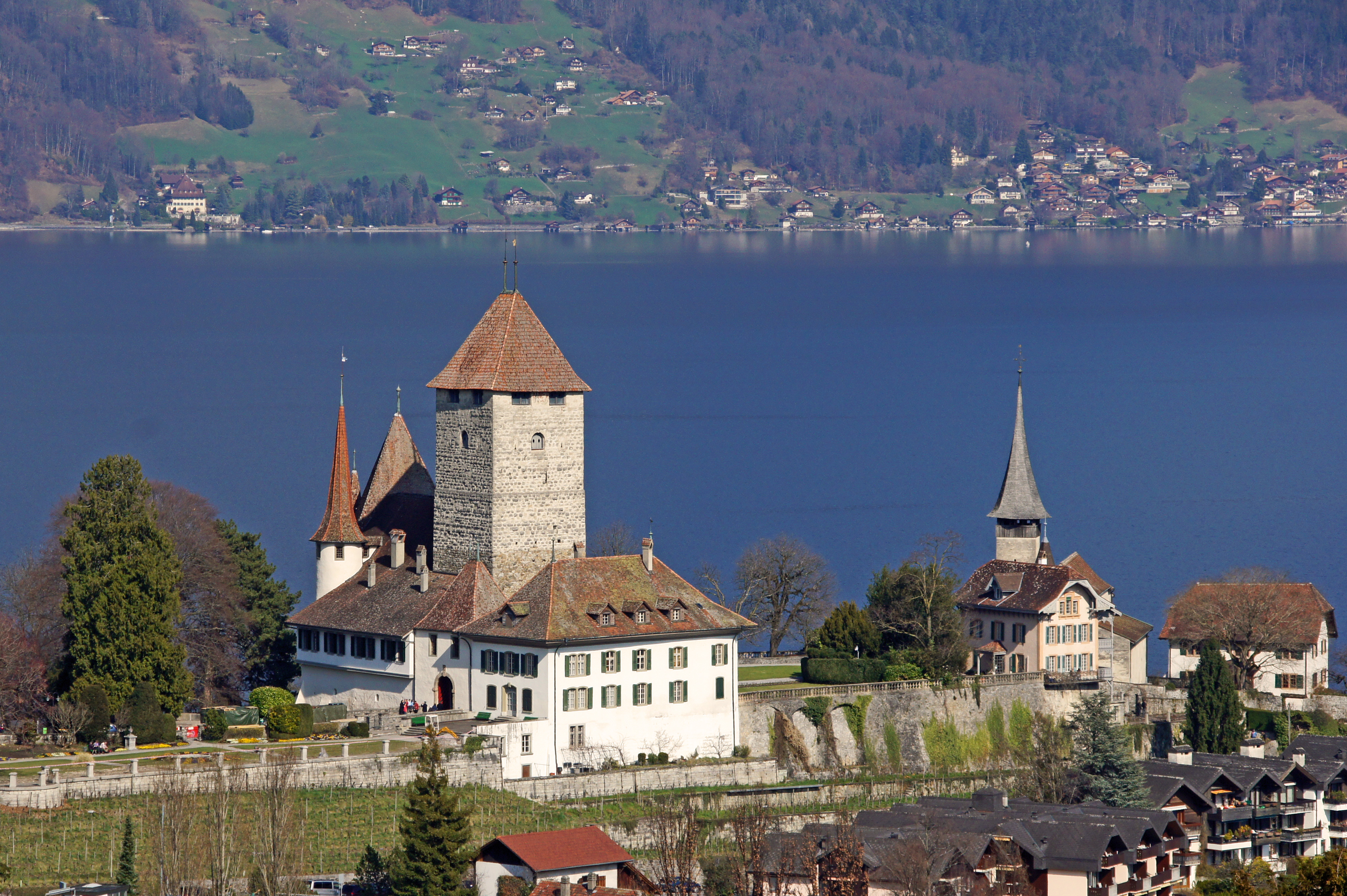 Schloss Spiez in der Schweiz